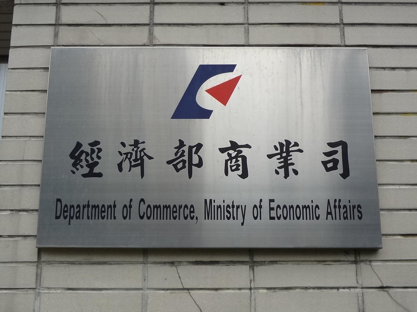 中華民國經濟部大樓一樓外牆，經濟部商業司銘板。上方圖案為經濟部部徽。